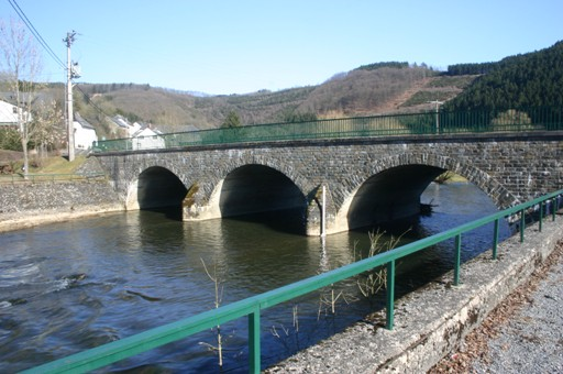 Bréck zu Ouren.